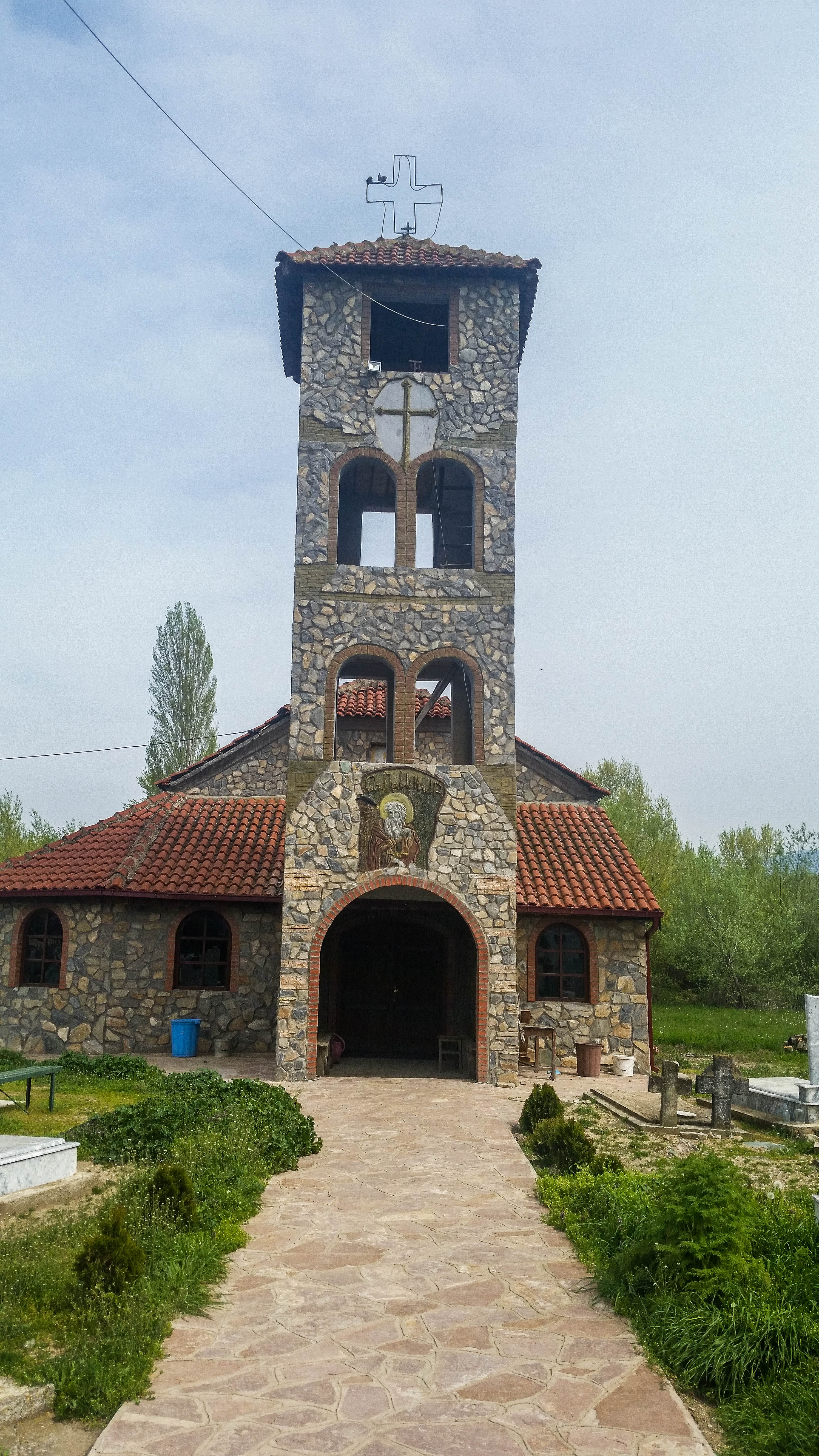 Црквата Свети Илија во Градско Балдовци